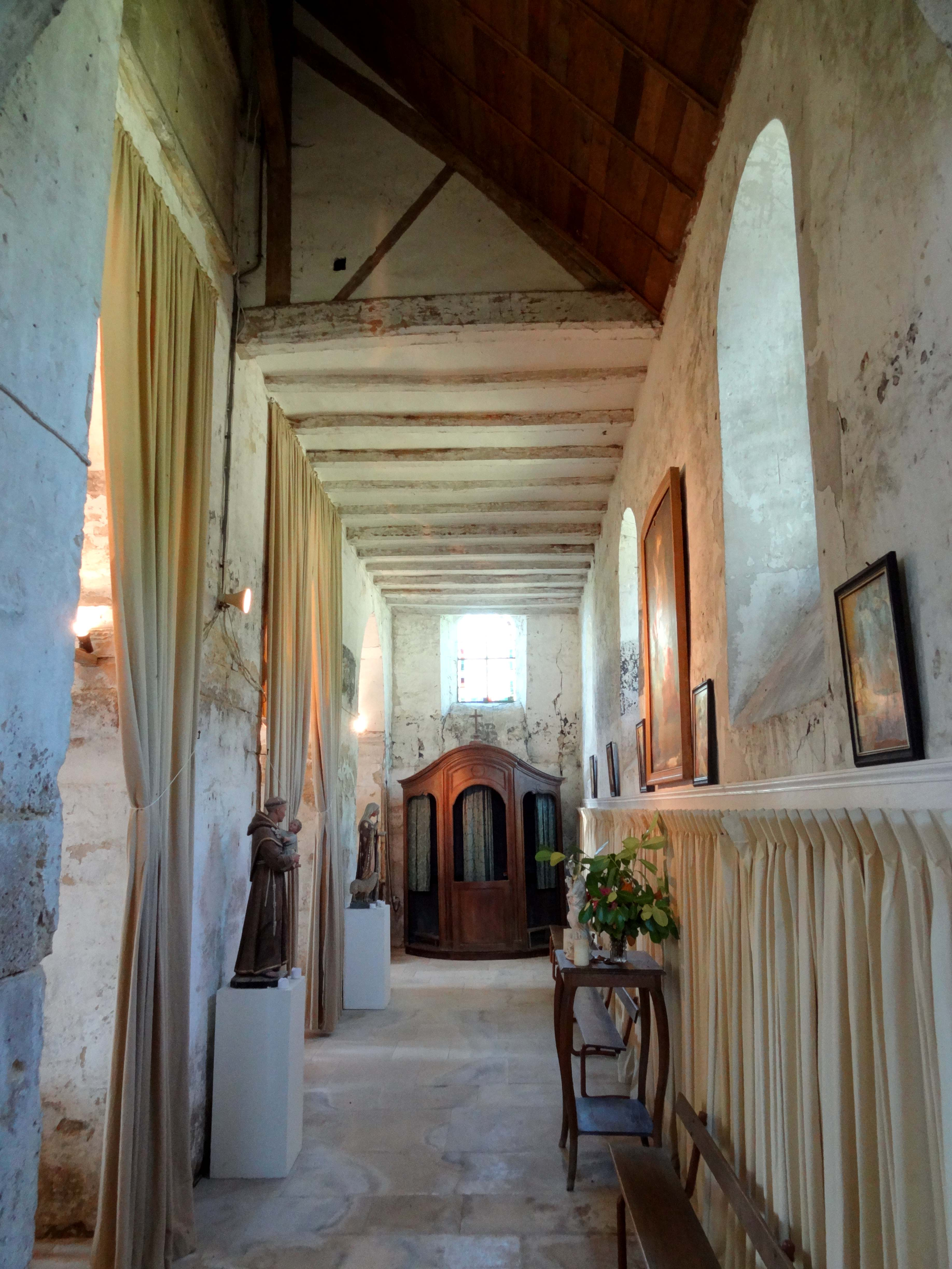 Intérieur de l'église - voir titre.